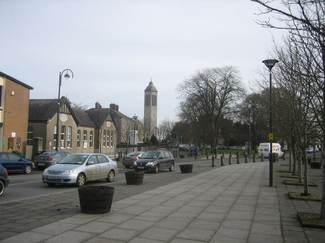 Изглед от Дънбойн